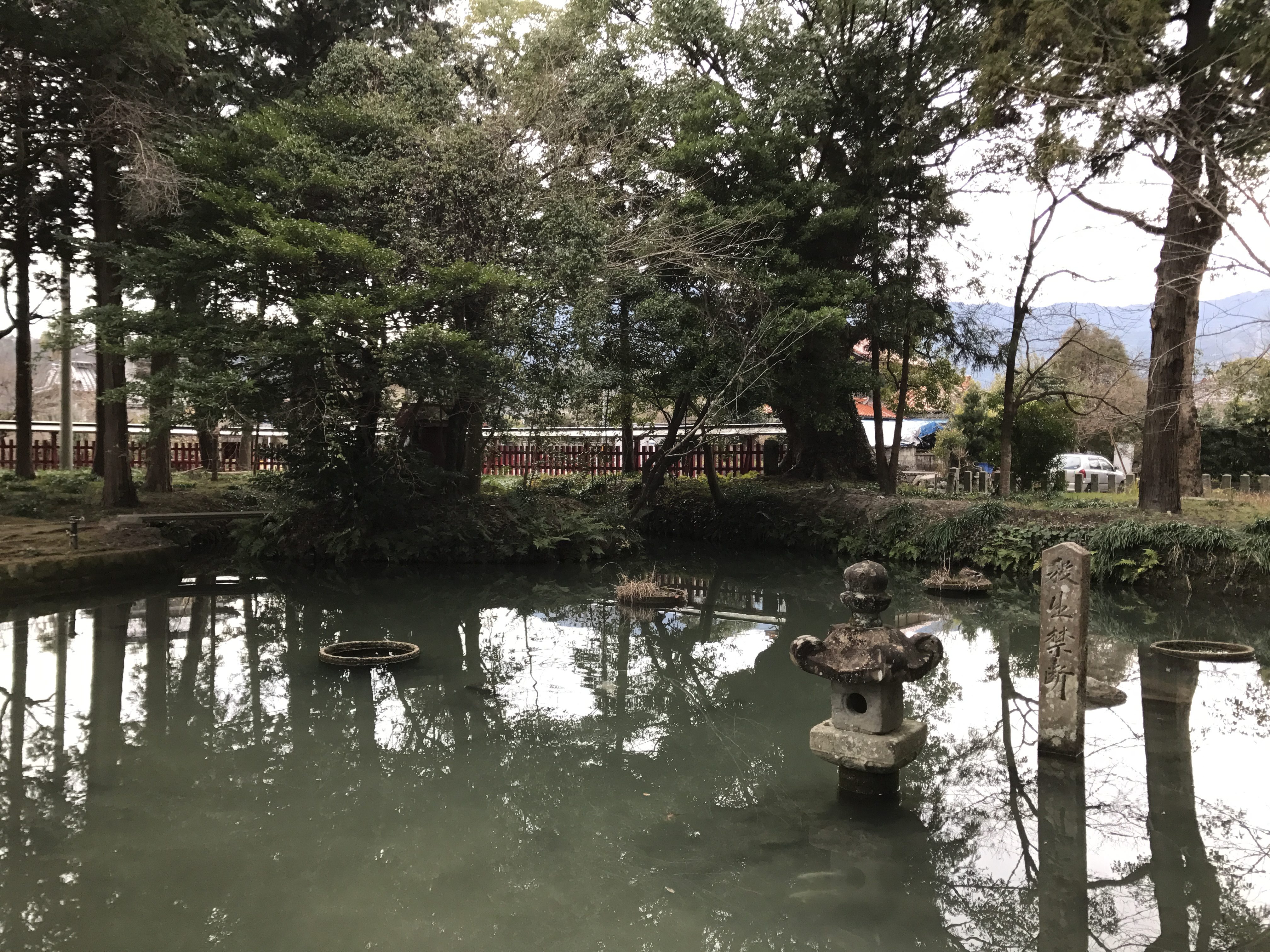 大分八幡宮の放生池